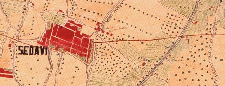 Sedaví el 1883 (el nord està a la dreta).